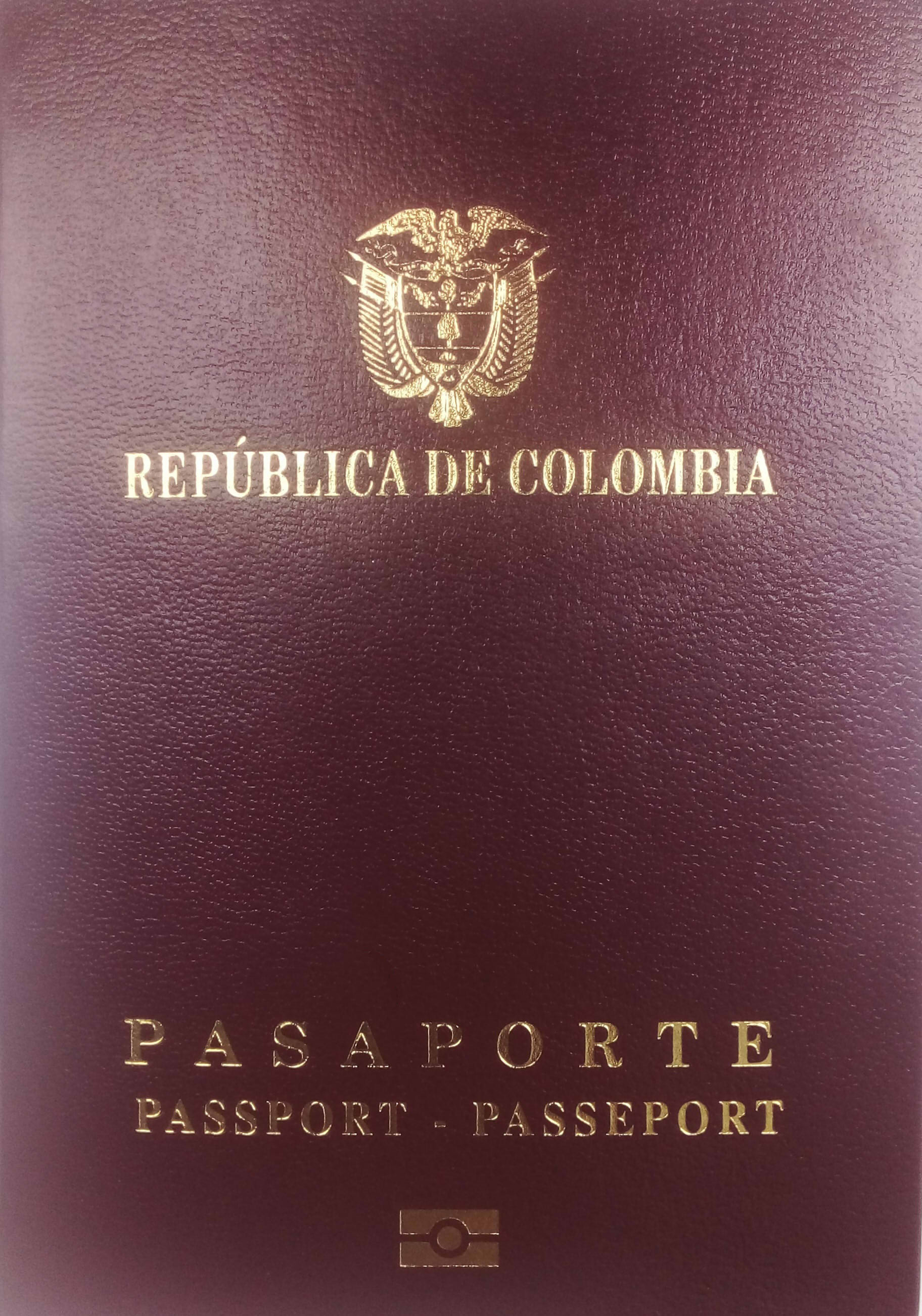 pasaporte colombiano